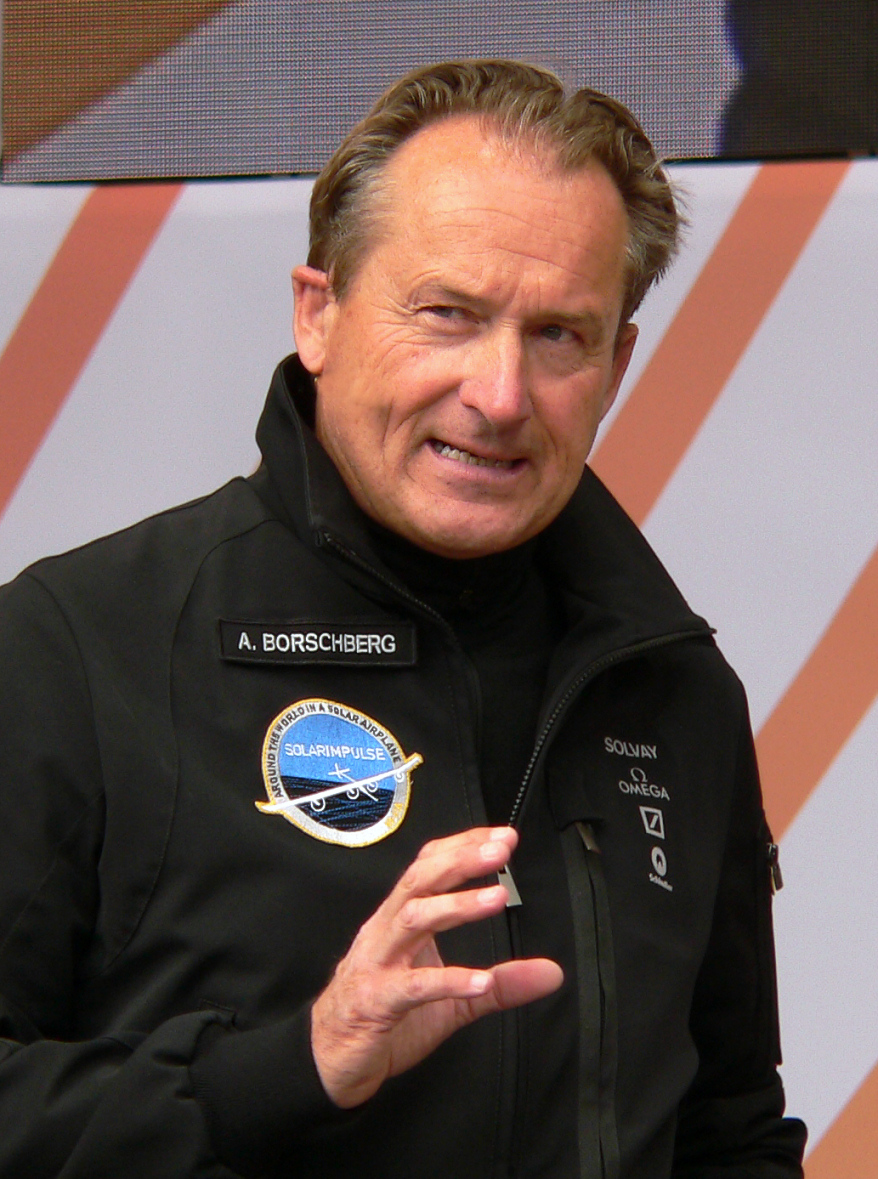 Andre Borschberg auf der IdeenExpo